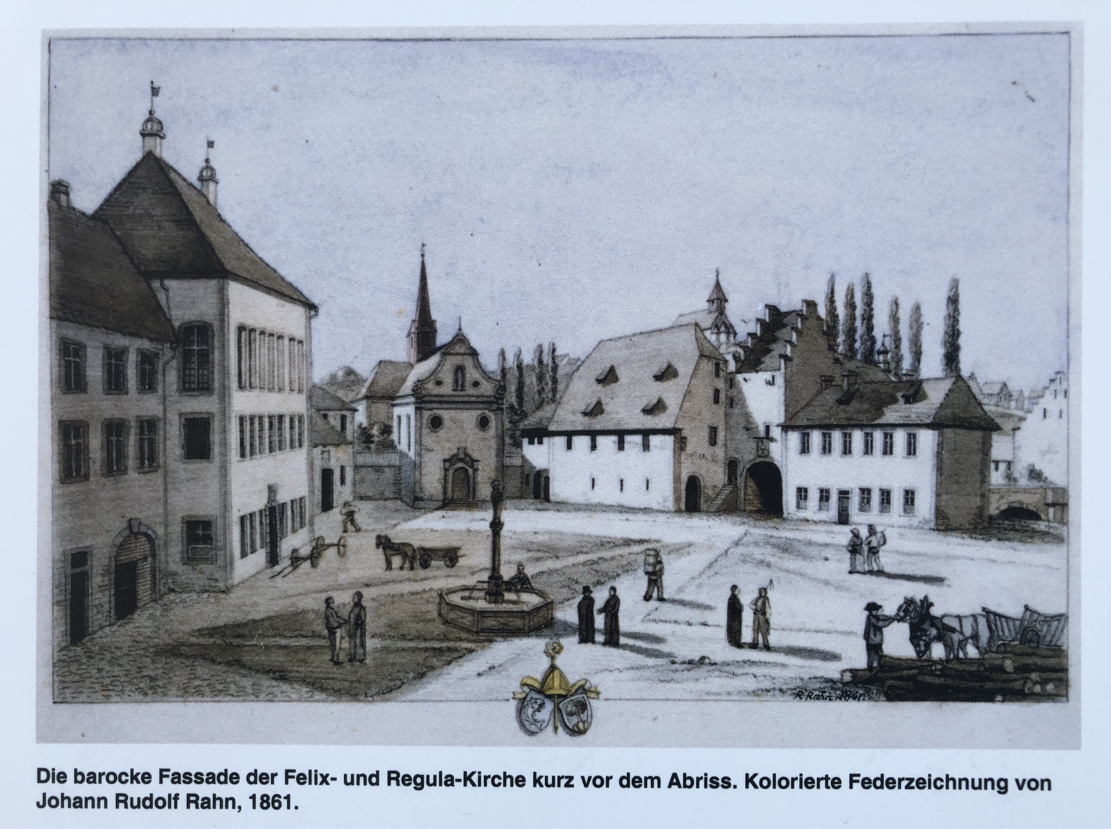 Kloster Rheinau: Felix- und Regula-Kirche kurz vor dem Abbruch 1861